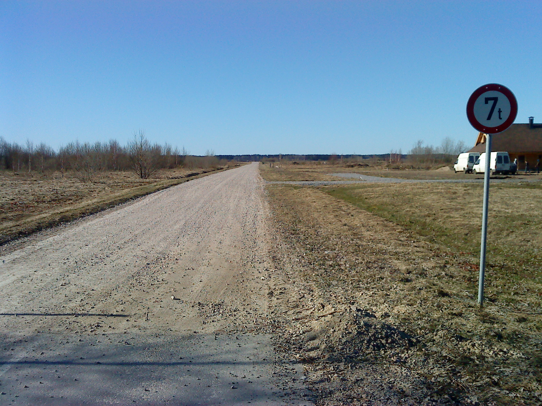 Pie Vīkuļiem